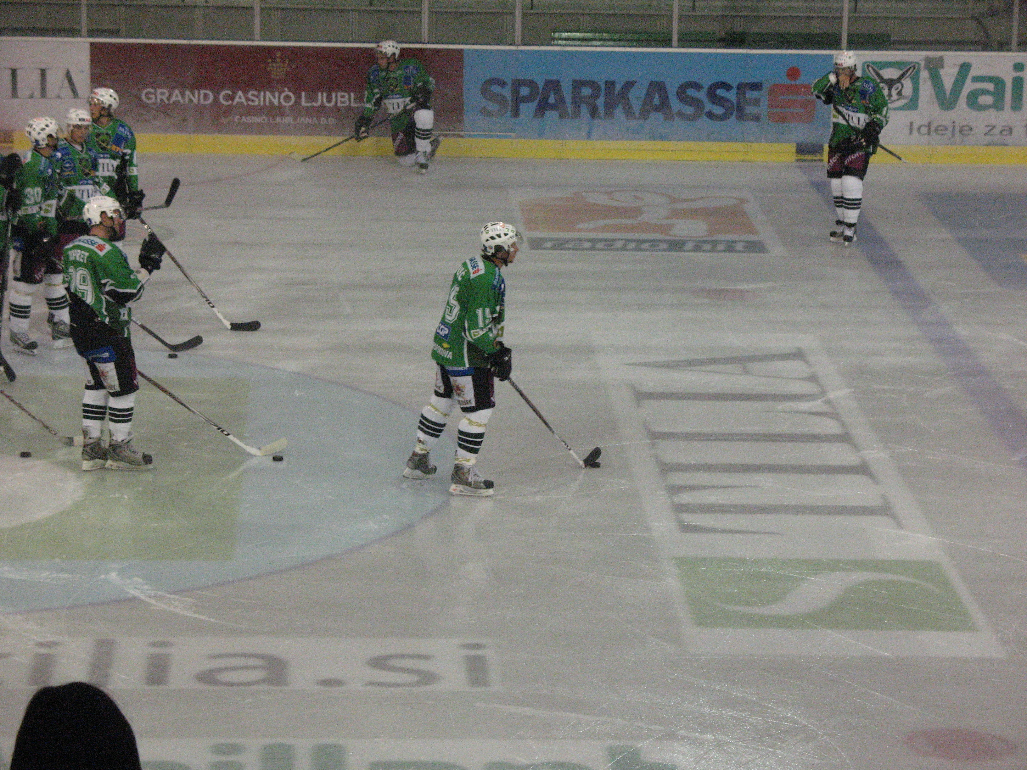 HDD Tilia Olimpija v Hali Tivoli.